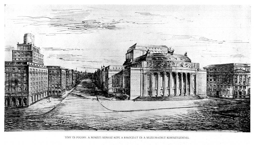 Mivel a Nemzeti Színház építése 1914-ben az első világháború miatt nem kezdődött el, Tőry Emil és Pogány Móric egészen 1928-ig tökéletesítették nyertes pályaművüket.